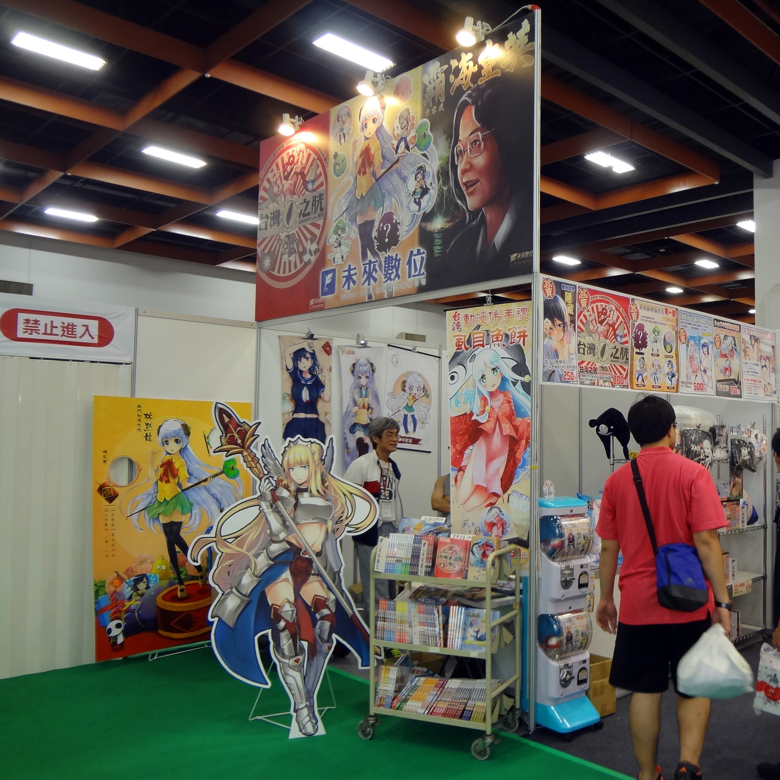 2016年（第17屆）漫畫博覽會，未來數位攤位。